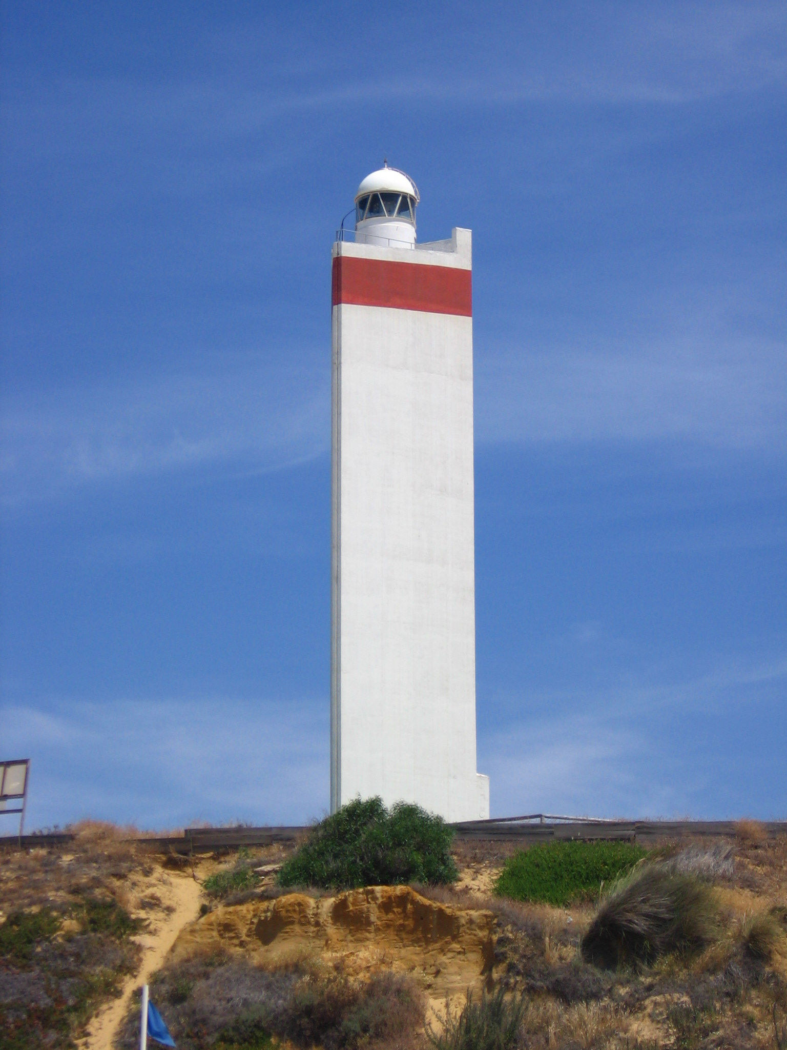 Faro de la playa de Matalascañas, Almonte, Huelva, España